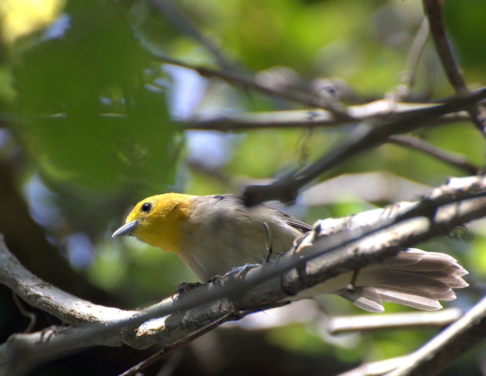 Thlypopsis sordida, Horto Florestal em São Paulo